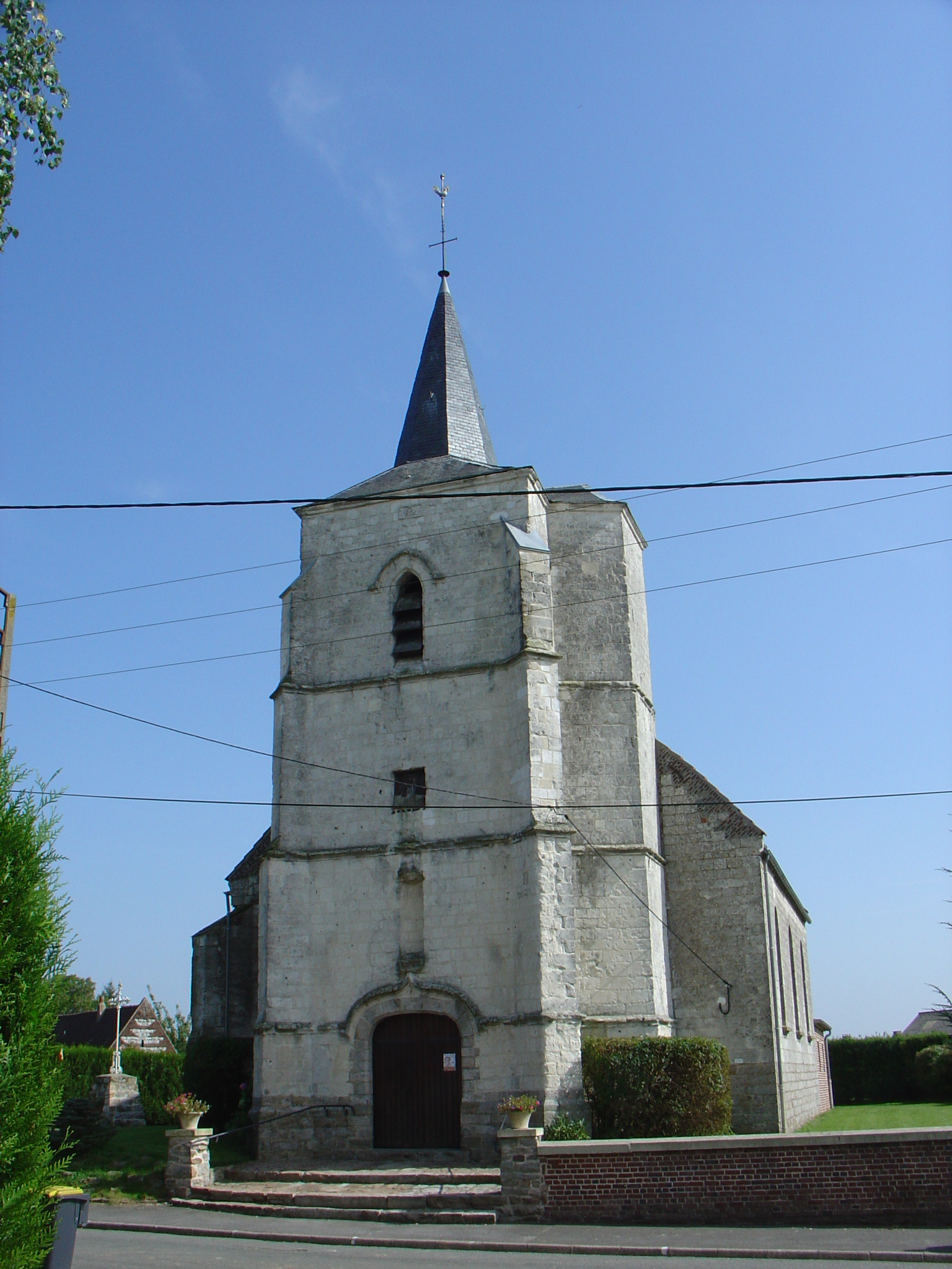 Église de Gouy-Servins